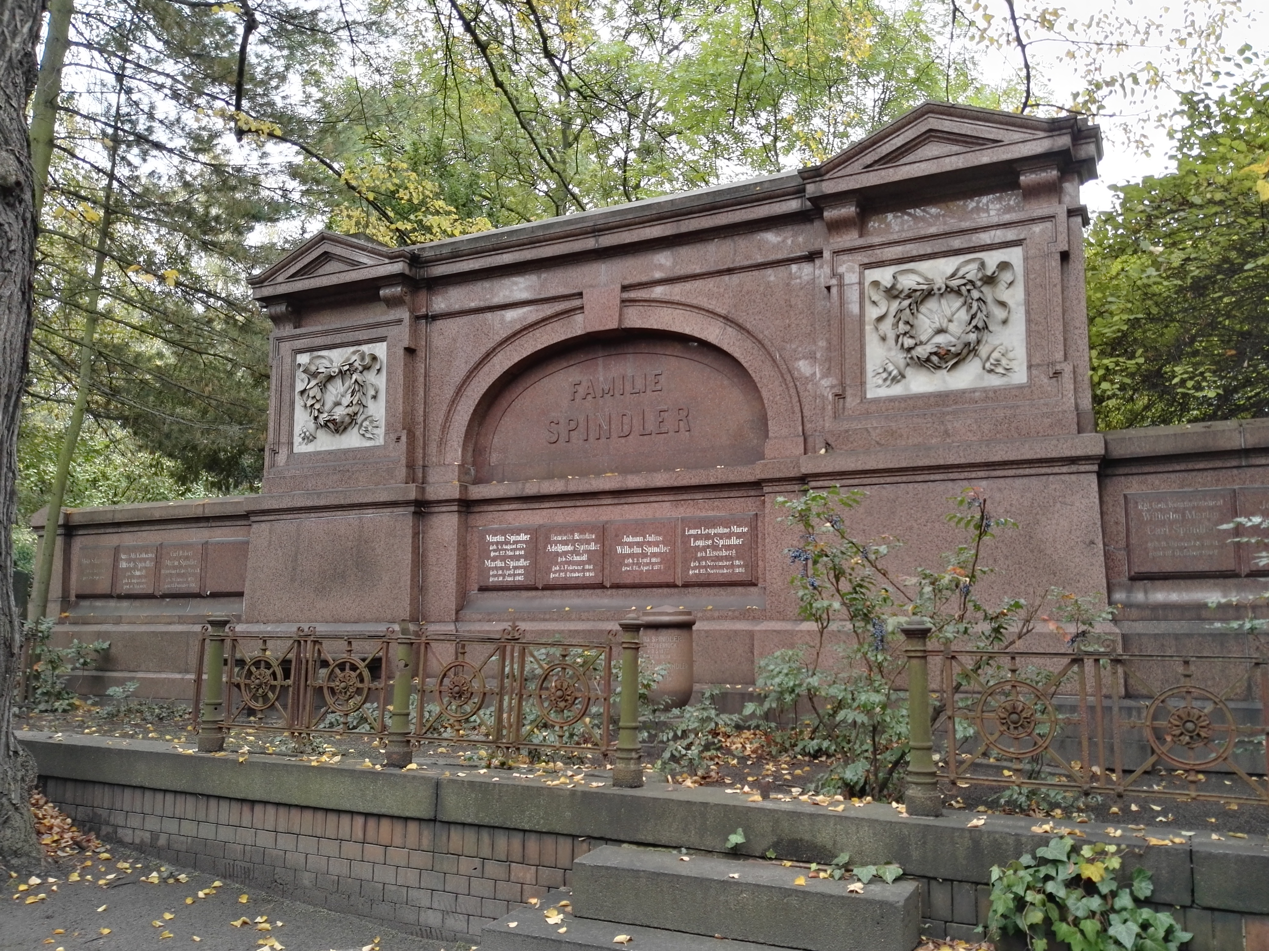 Grab von Johann Julius Wilhelm Spindler und Carl Spindler (Ehrengrab) auf dem St.-Marien- und St.-Nicolai-Friedhof Pankow